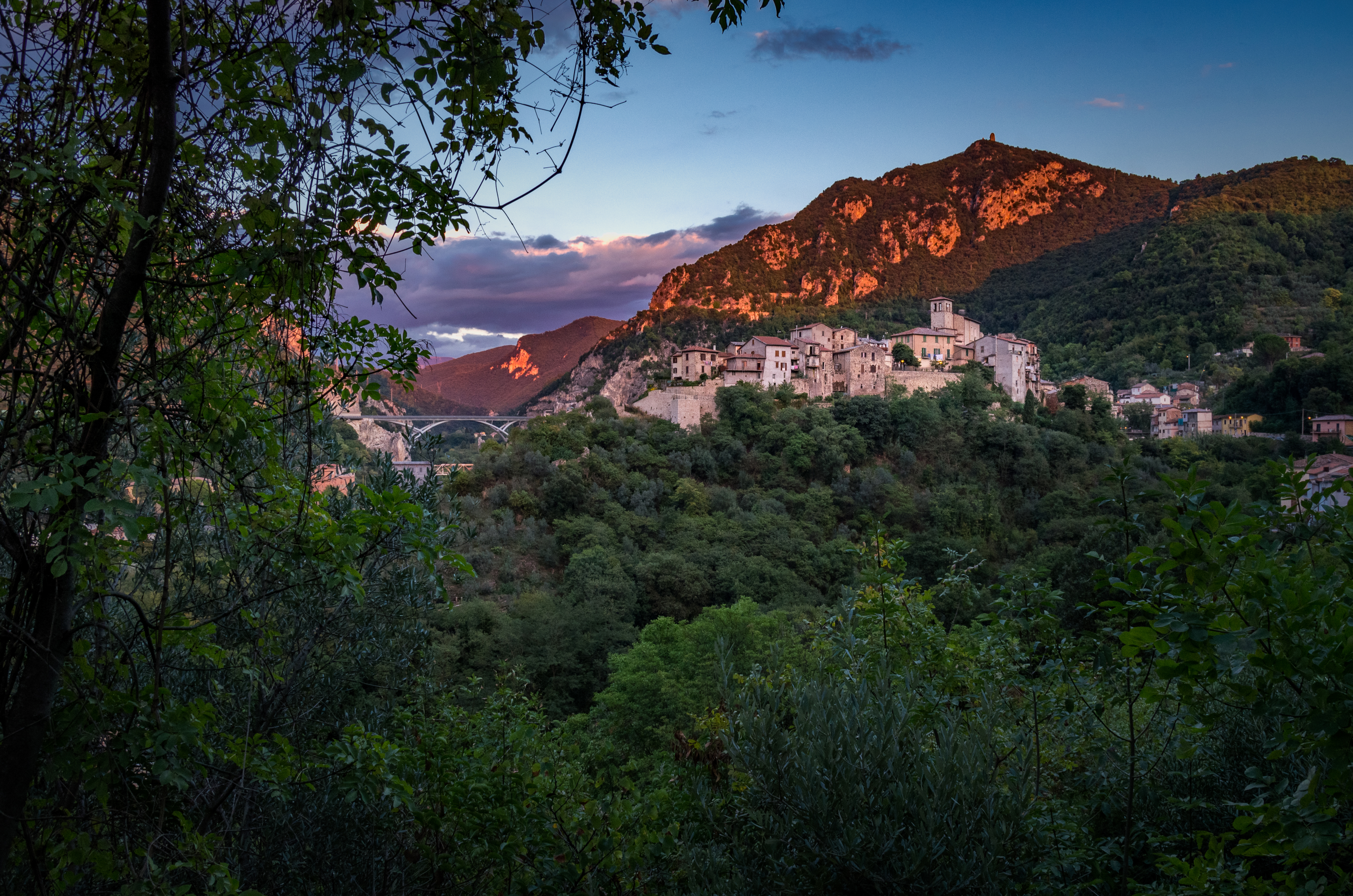 Antico borgo fortificato che in epoca medievale fu proprietà del libero comune di Terni. Sullo sfondo, nella montagna, è visibile la diroccata fortezza di Monte San'angelo che l'esercito ternano aveva costruito per controllare le Marmore e gli spostamenti delle milizie reatine.